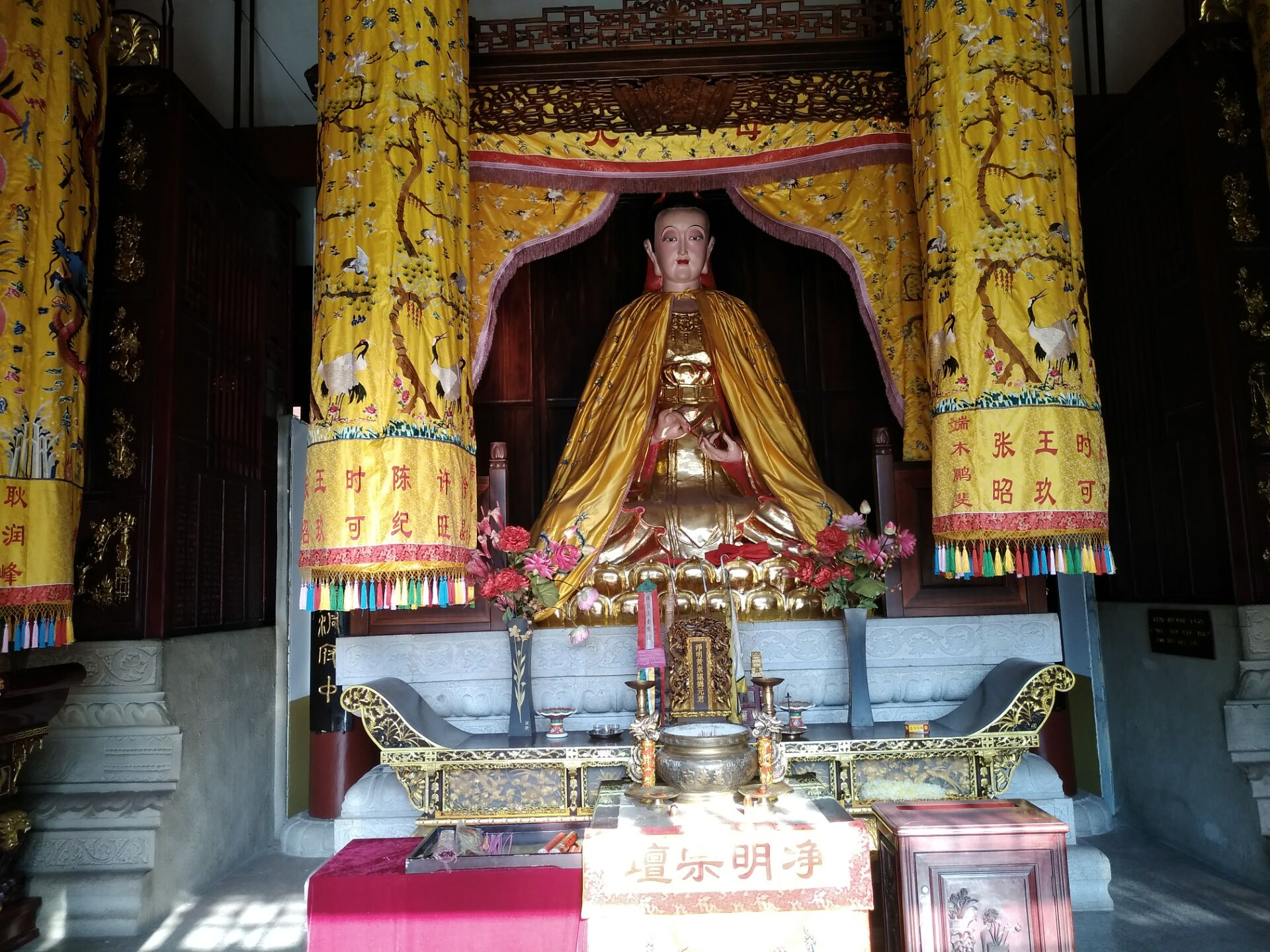 宗教人物像